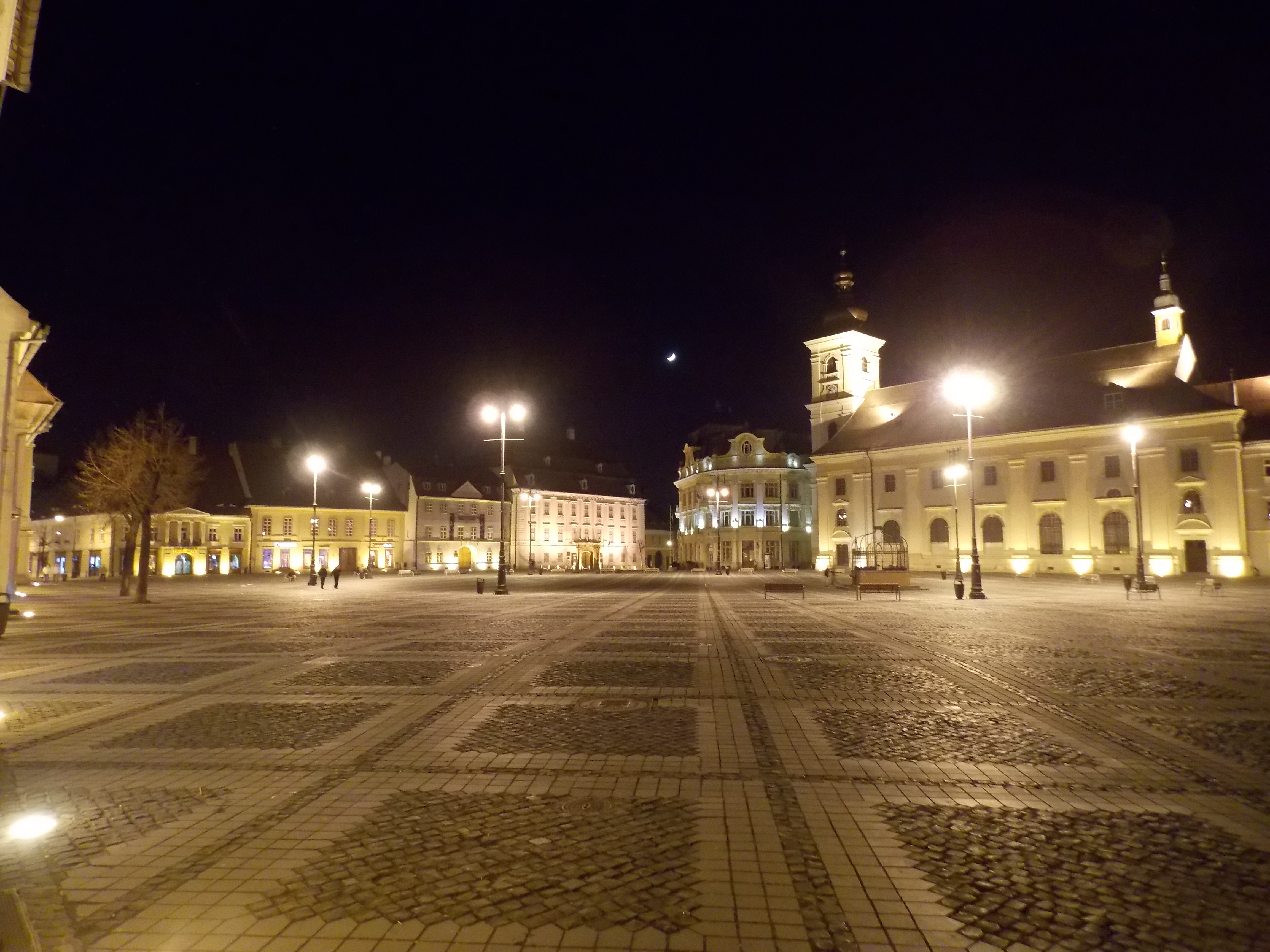 Piata Mare (Large Square), seen from the western corner.